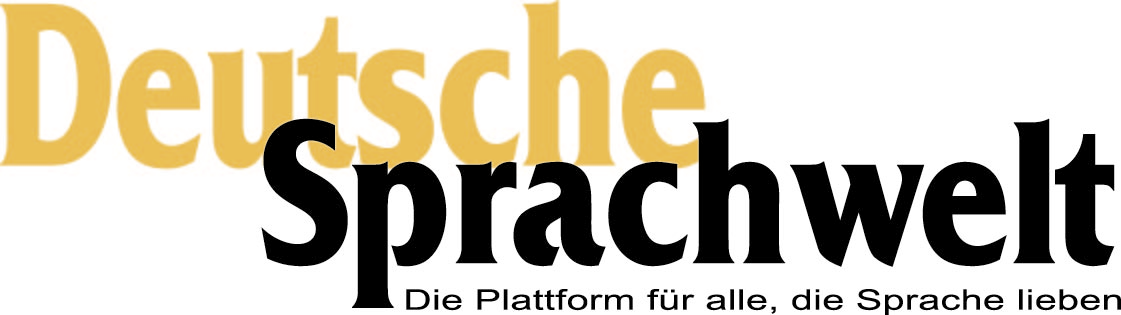 Logo, Schöpfungshöhe gering